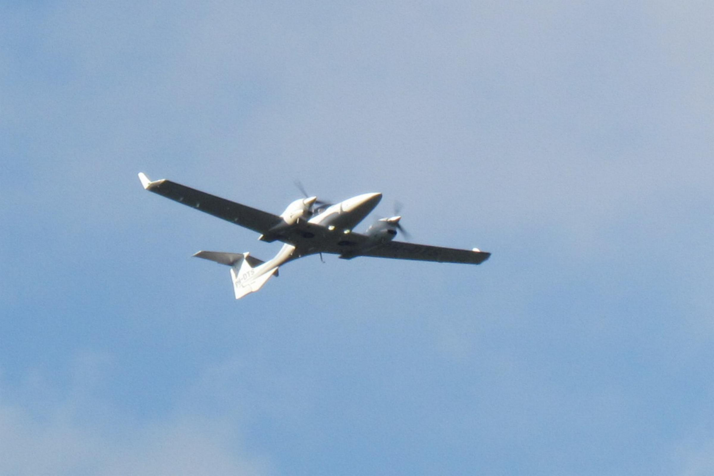 Flugverkehr über Teveren. Eine Diamond DA42 Twin Star (mit Dieselmotoren) mit dem Kennzeichen PH-DTS, gehört einer Flugschule "Wings over Holland" aus Lelystad/NL.